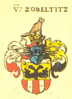 Wappen der Sächsischen und Meißner Adelsfamilie Zobeltitz